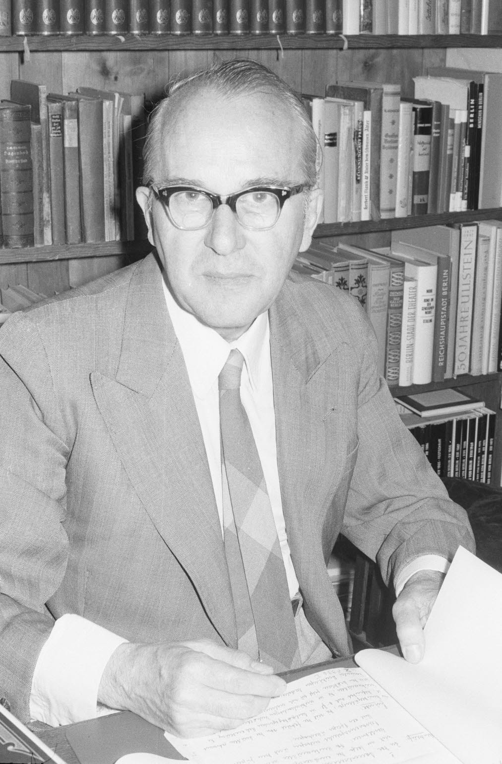 Günther Roestel (1908–1986), Jugend- und Vormundschaftsrichter i. R.